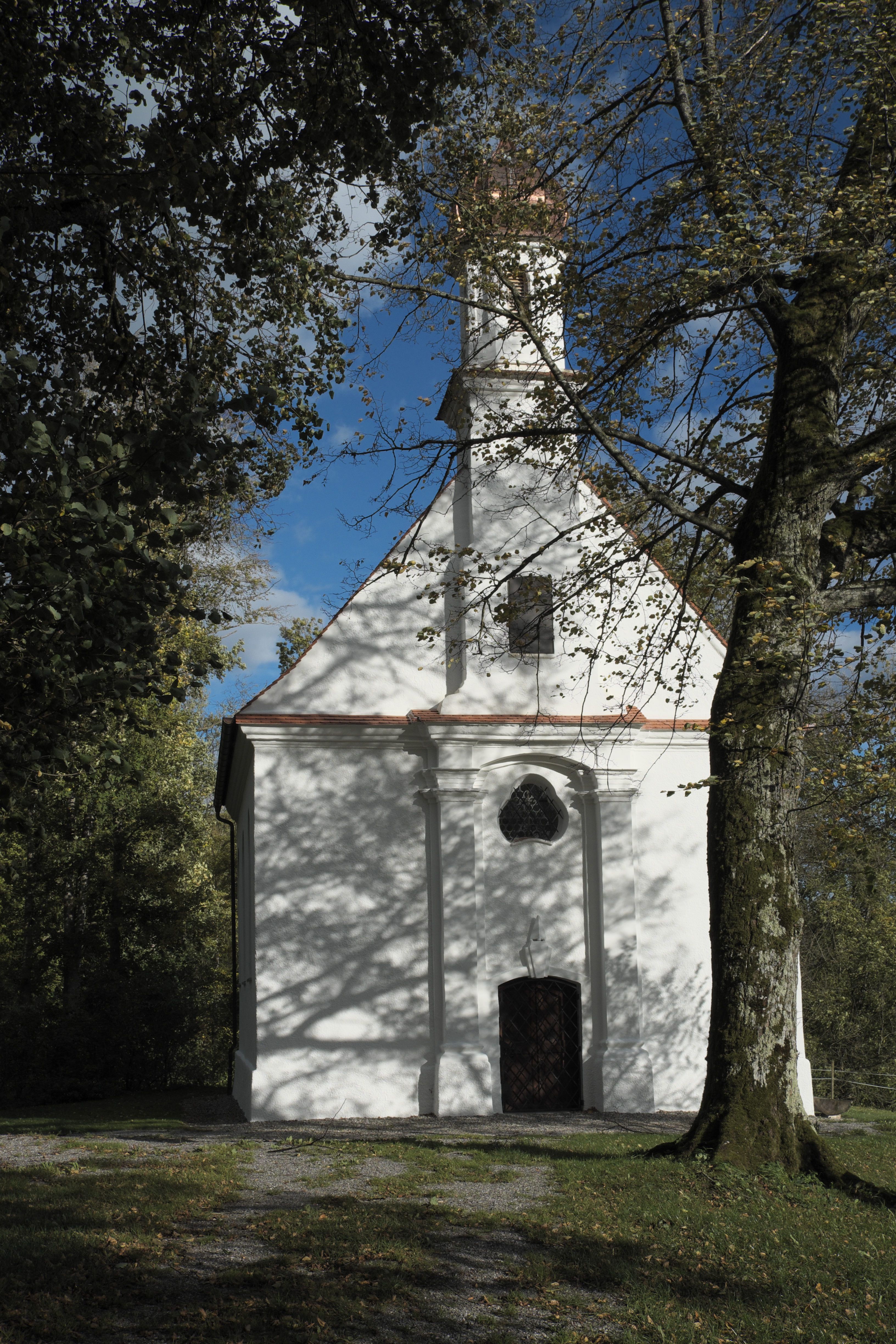 Katholische Kapelle St. Lorenz in Epfach (Denklingen) im Landkreis Landsberg am Lech (Bayern/Deutschland), Westfassade mit Dachreiter und Zwiebelhaube